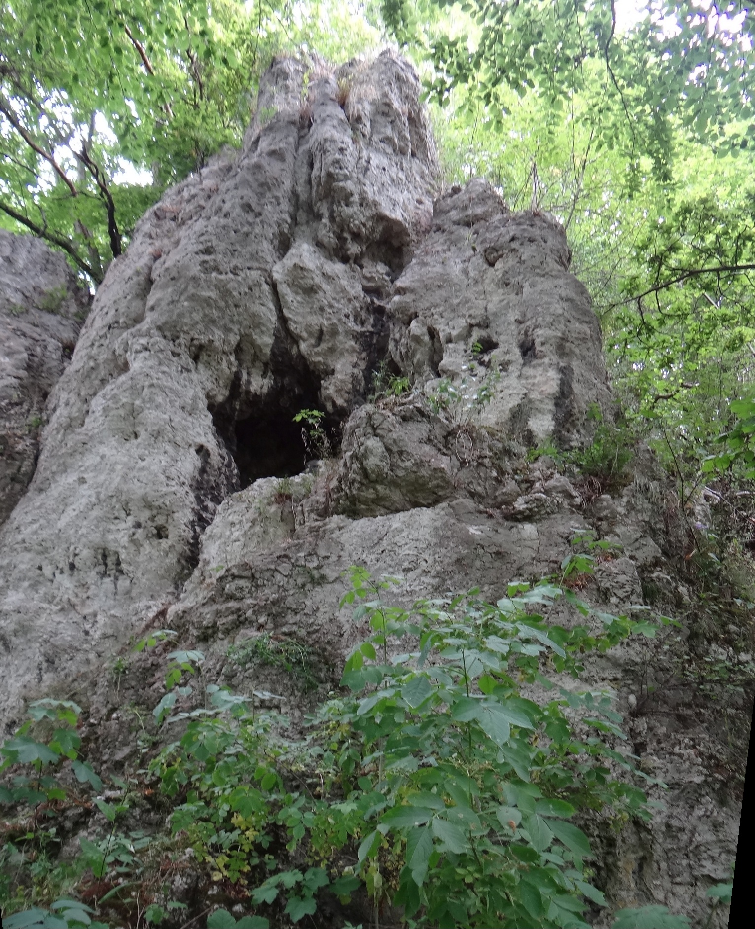 Skała Pociski w Dolinie Ostryszni w Imbramowicach